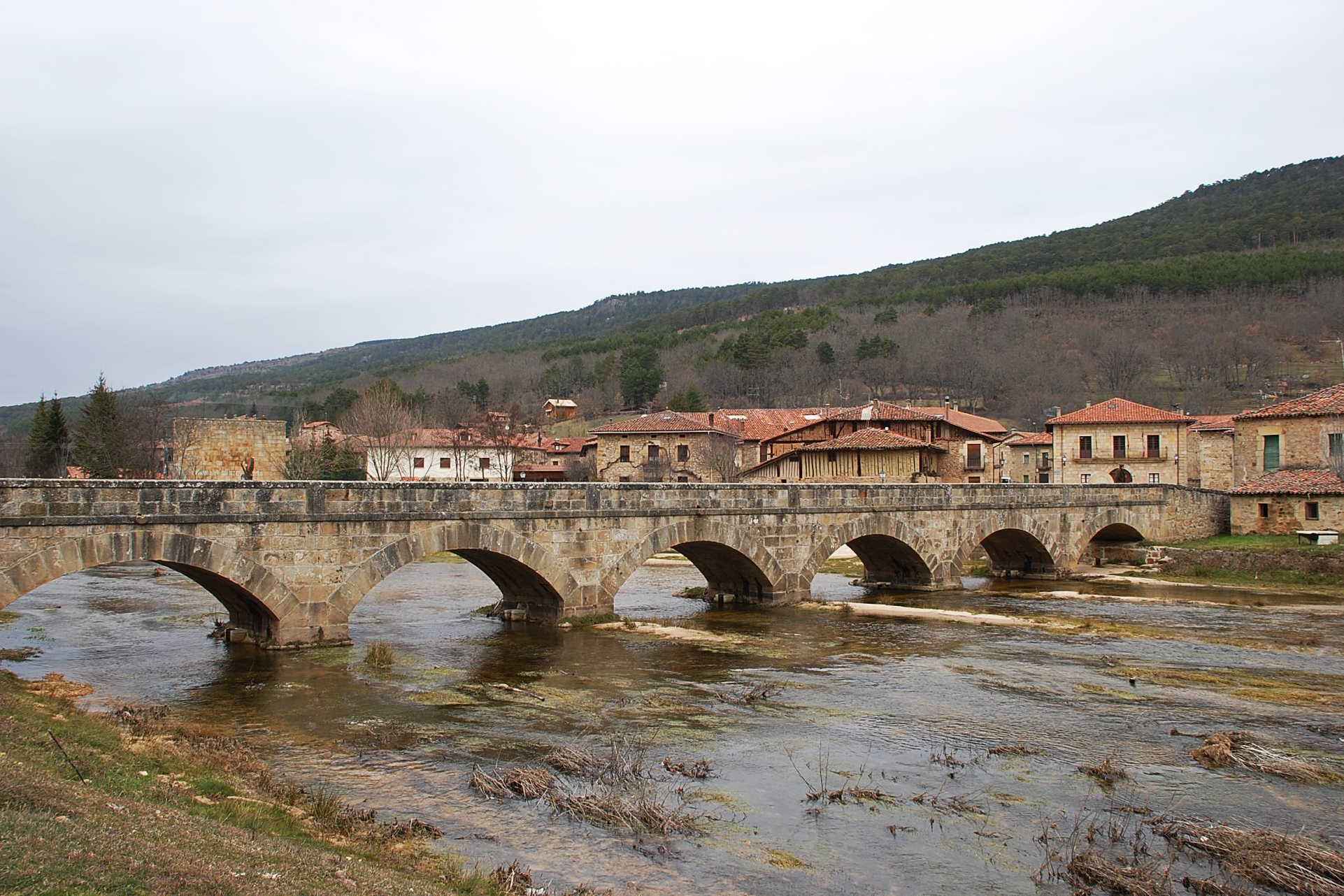 El río Duero a su paso por Salduero (Soria, Castilla y León).